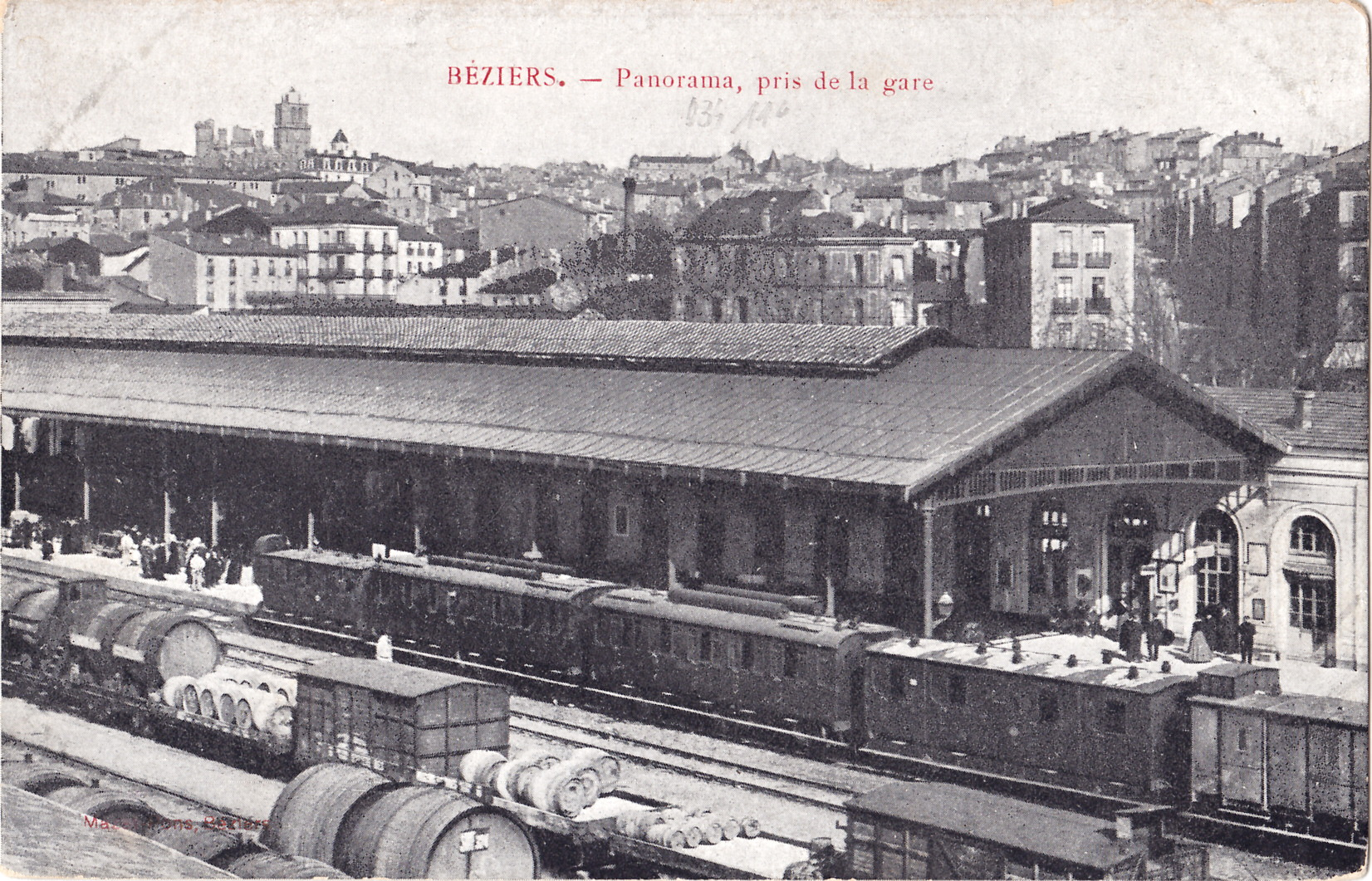 Carte postale ancienne éditée par Pons à Béziers : BEZIERS - Panorama, vu de la Gare